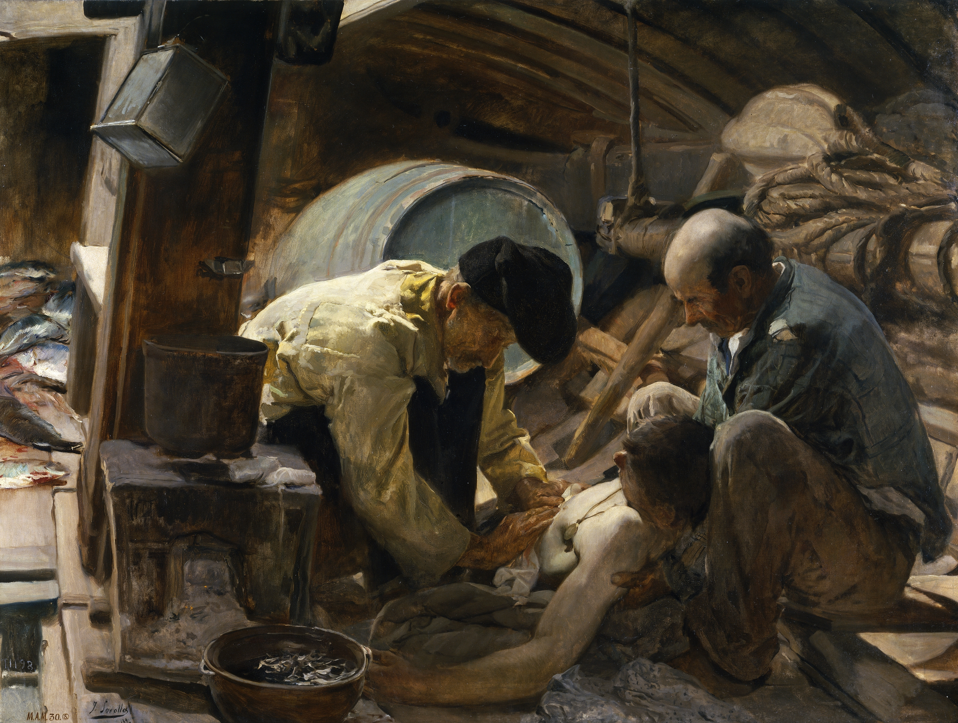 En el interior de un barco dos pescadores de edad avanzada con semblante serio y preocupado atienden a otro más joven tendido en el suelo tras sufrir un accidente. Del torso de éste pende una medalla protectora contra los infortunios de la mar como el que acaba de sucederle. Alrededor de los personajes se observan diversos aperos de pesca e incluso algunos peces capturados.